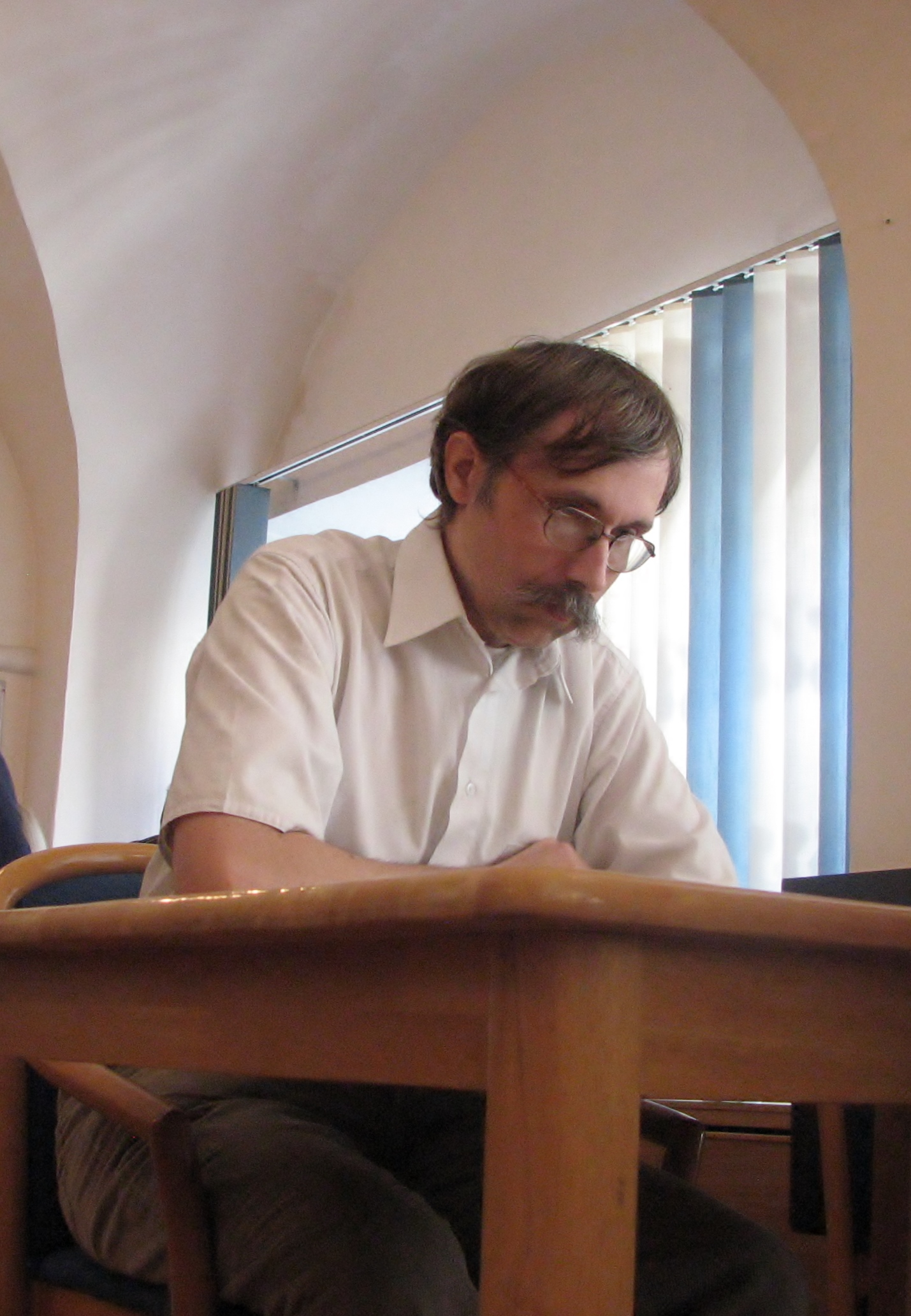 Taivo Rist mängimas Eesti meistrivõistlustel 64-ruudulises kiirkabes